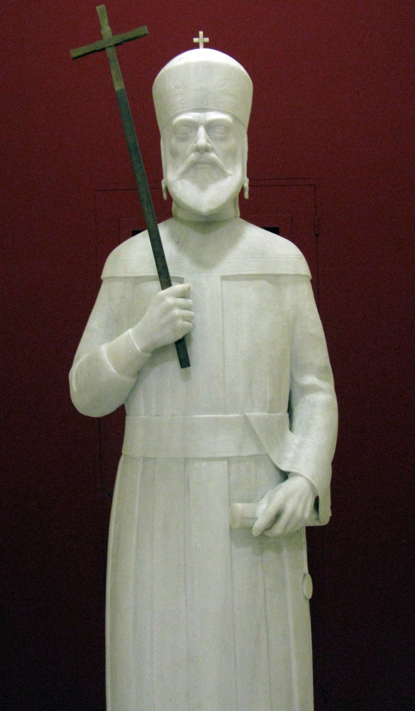 National Historical Museum. Athens, Greece. --- Κωνσταντίνος ΙΑ’ Παλαιολόγος " Ανδριάντας του τελευταίου αυτοκράτορα του Βυζαντίου (1449-1453), που σκοτώθηκε υπερασπιζόμενος την Κωνσταντινούπολη από τους Οθωμανούς πολιορκητές του Μωάμεθ του πορθητή. Έργο του γλύπτη Νικόλα. " Εθνικό Ιστορικό Μουσείο. Αθήνα.